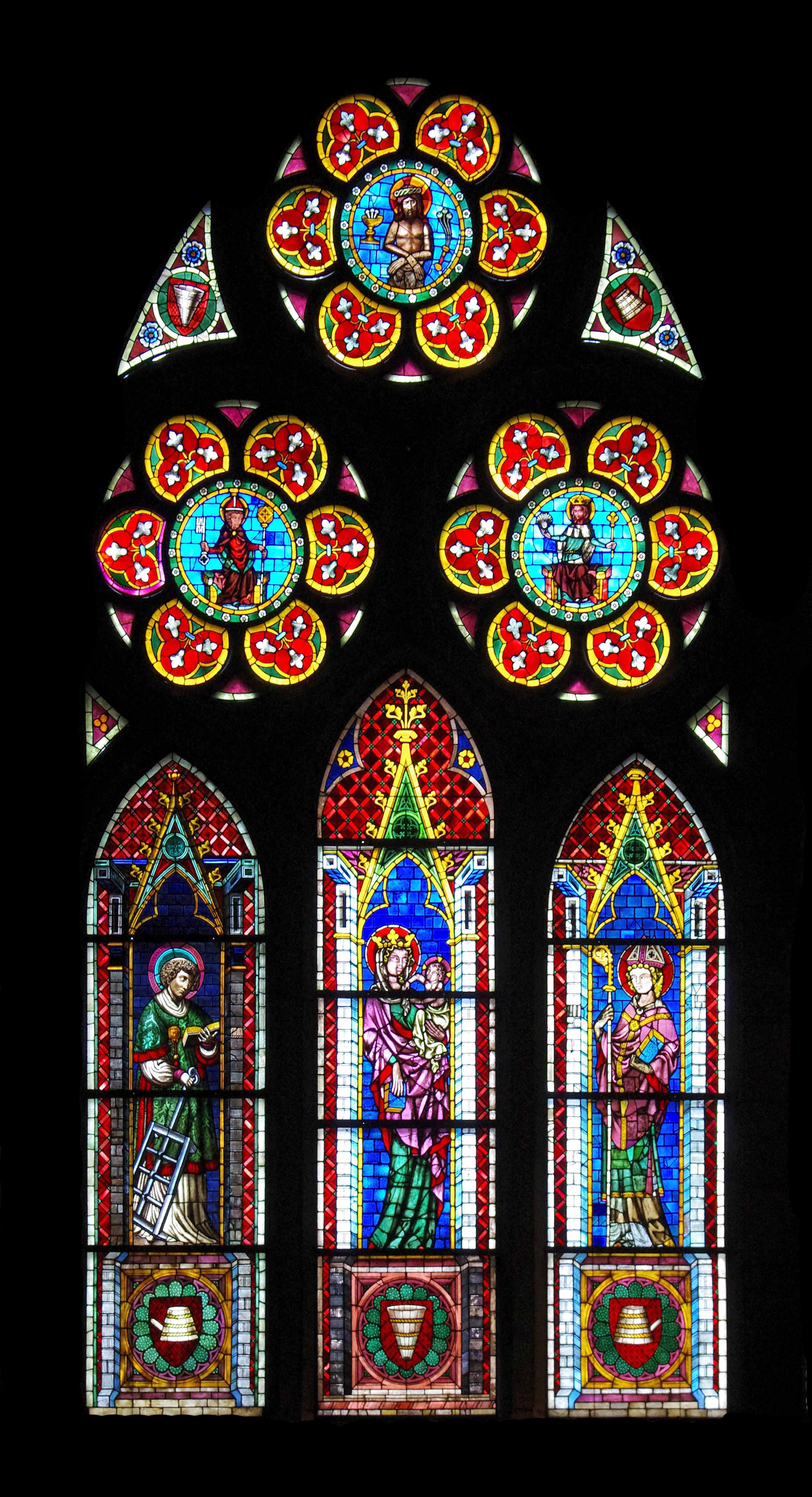 Die Glasfenster im Freiburger Münster